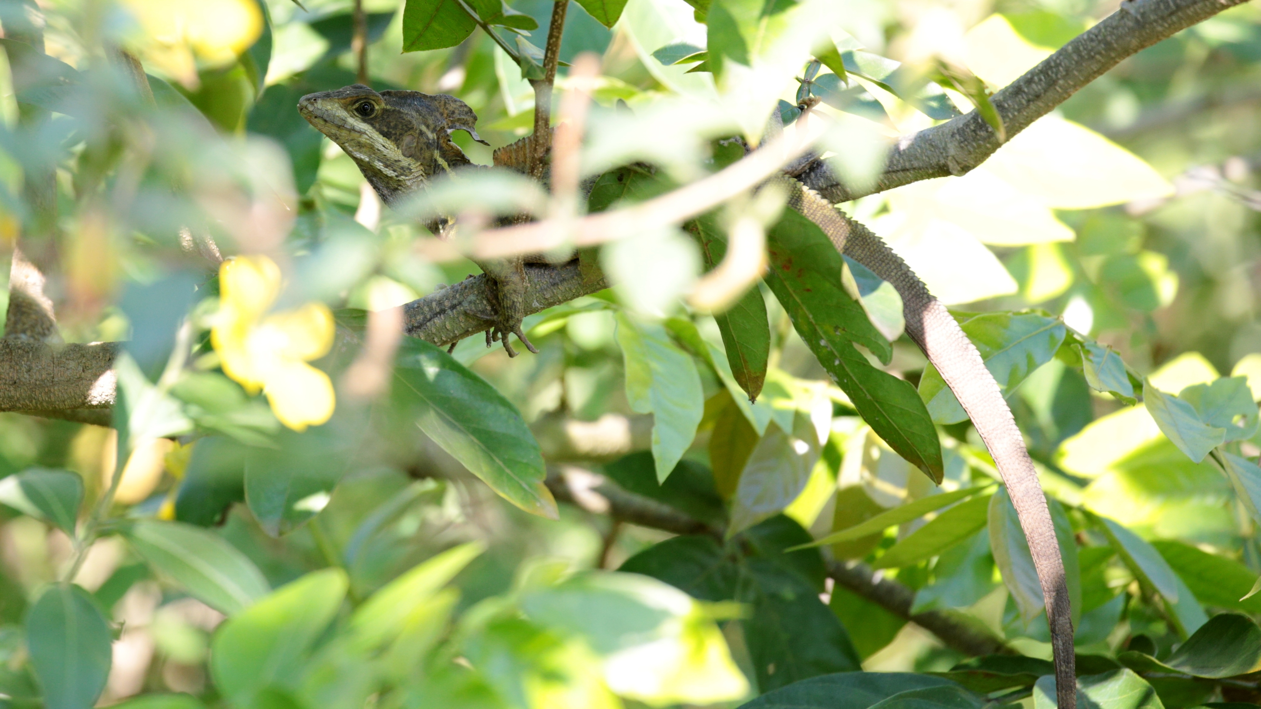 Toloque rayado